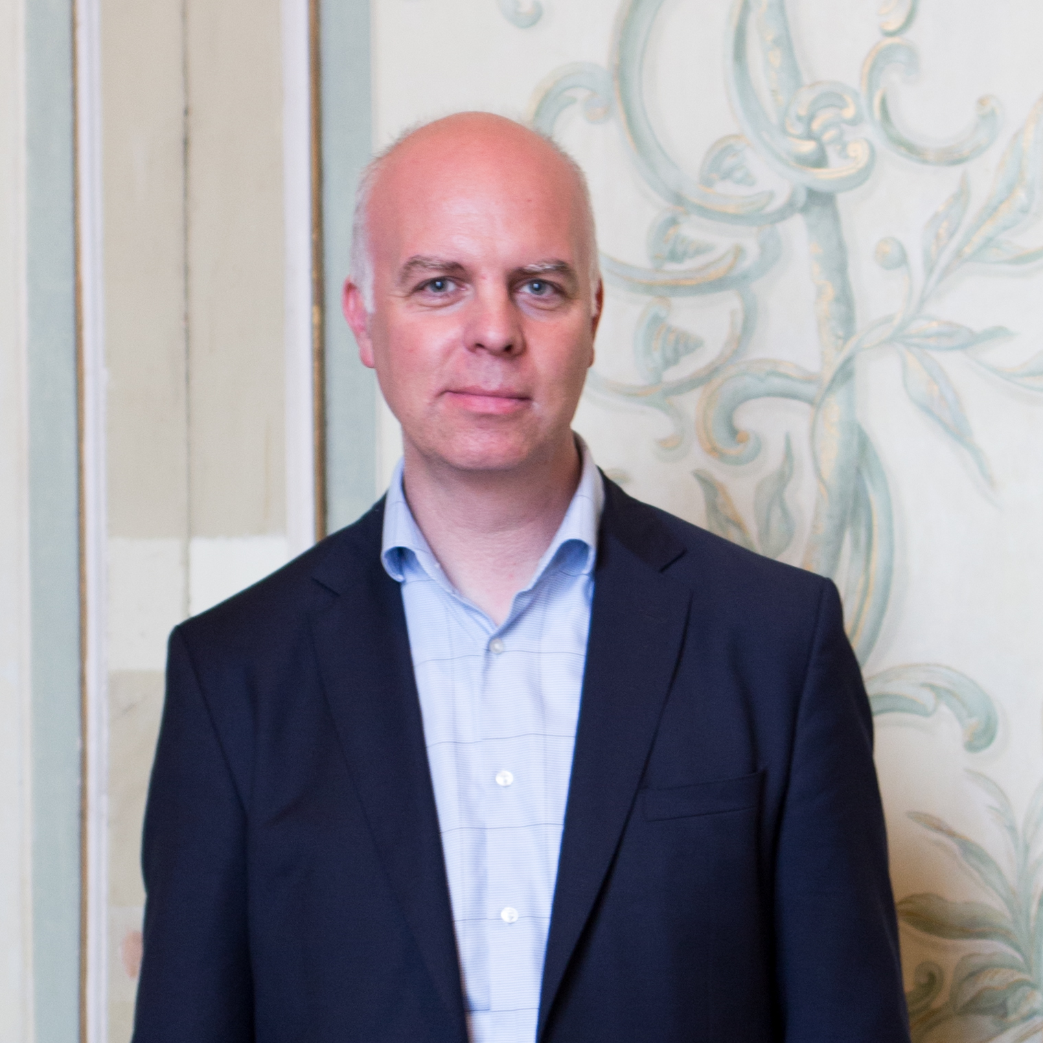 Sonderausstellung im Neuen Palais: Kaiserdaemmerung; Jörg Kirschstein